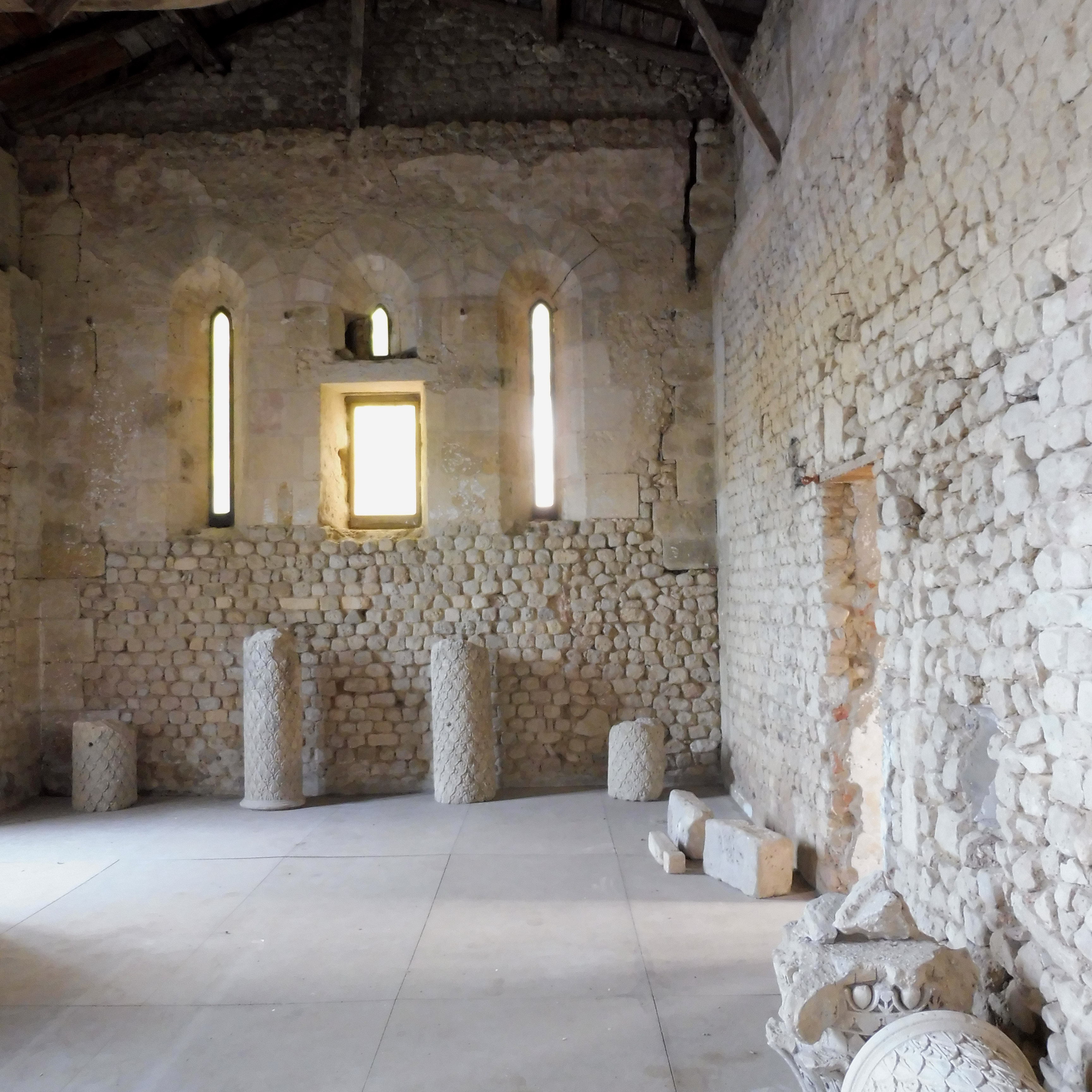 Chapelle Saint-Romain, Loupiac-33.